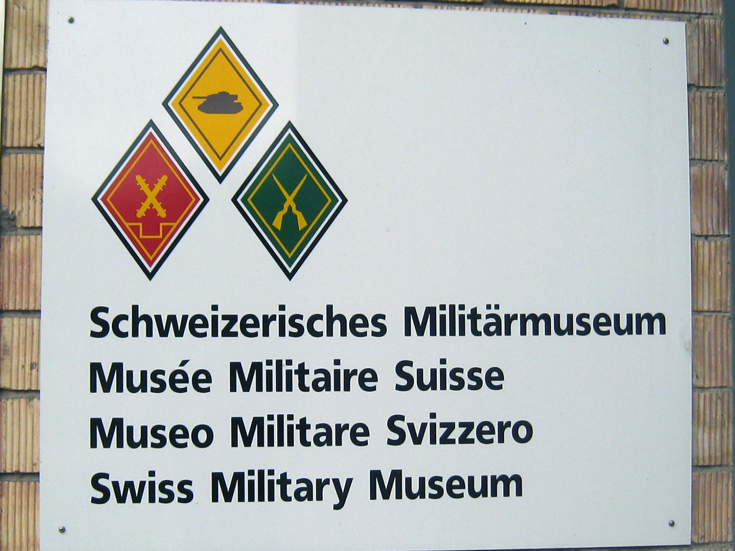 Schild Militärmuseum Full